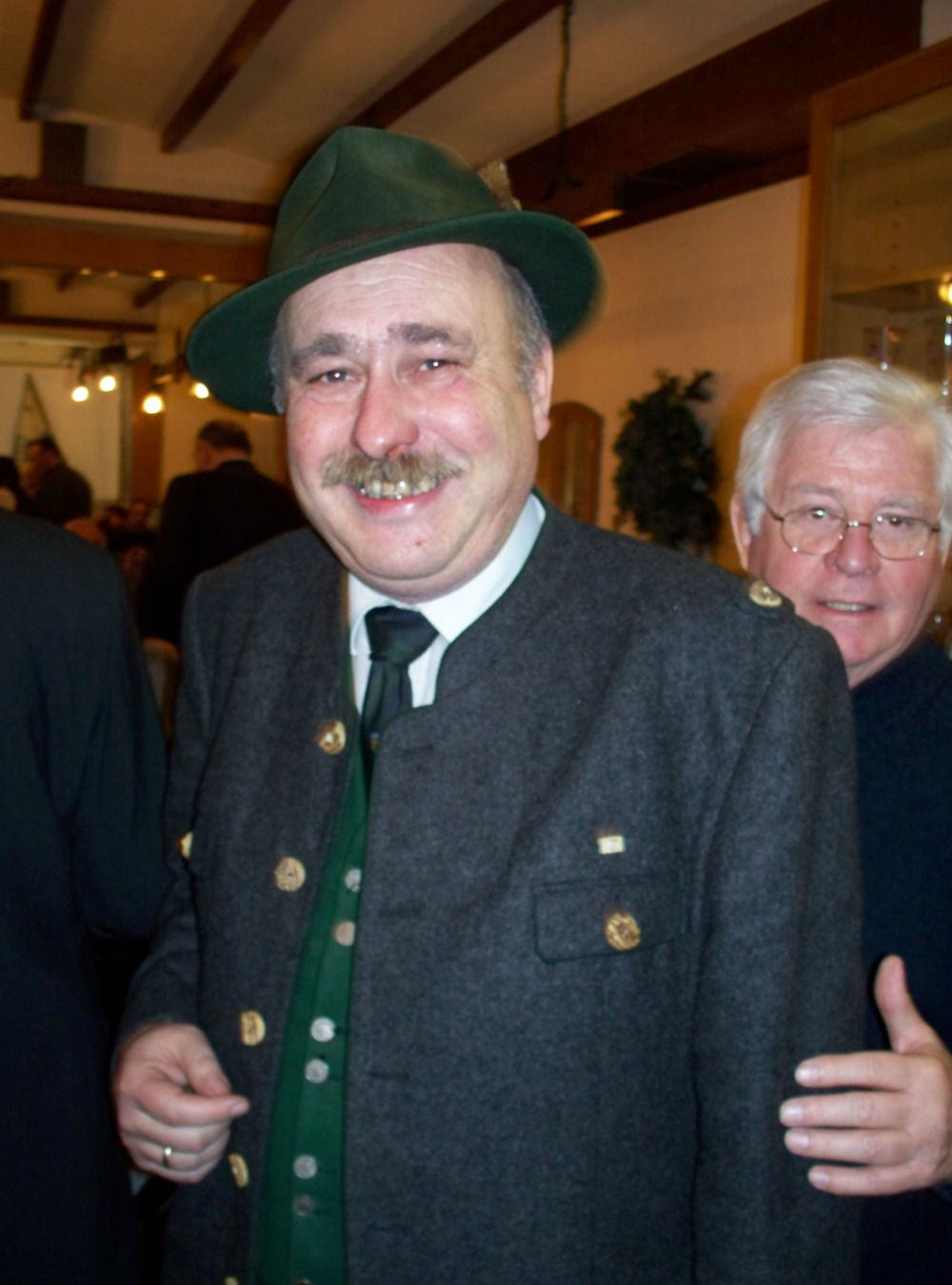 Hubert Dorn nach seiner Rede am Politischen Aschermittwoch der Bayernpartei in Vilshofen an der Donau im Jahr 2011.